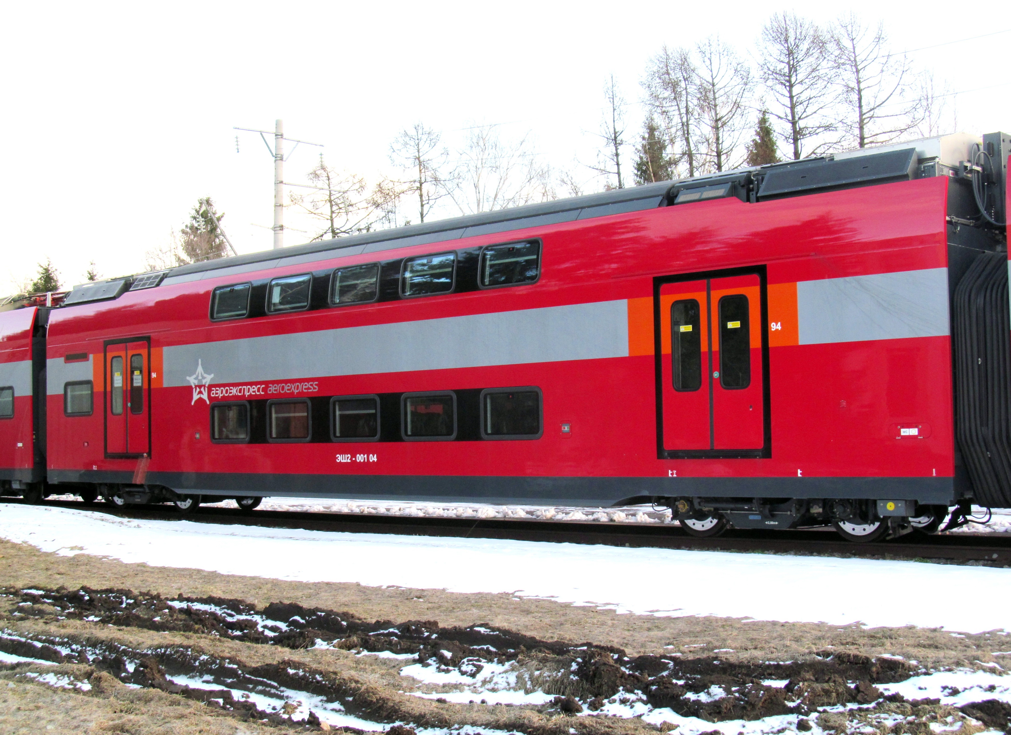 Выровненное изображение вагона электропоезда ЭШ2.